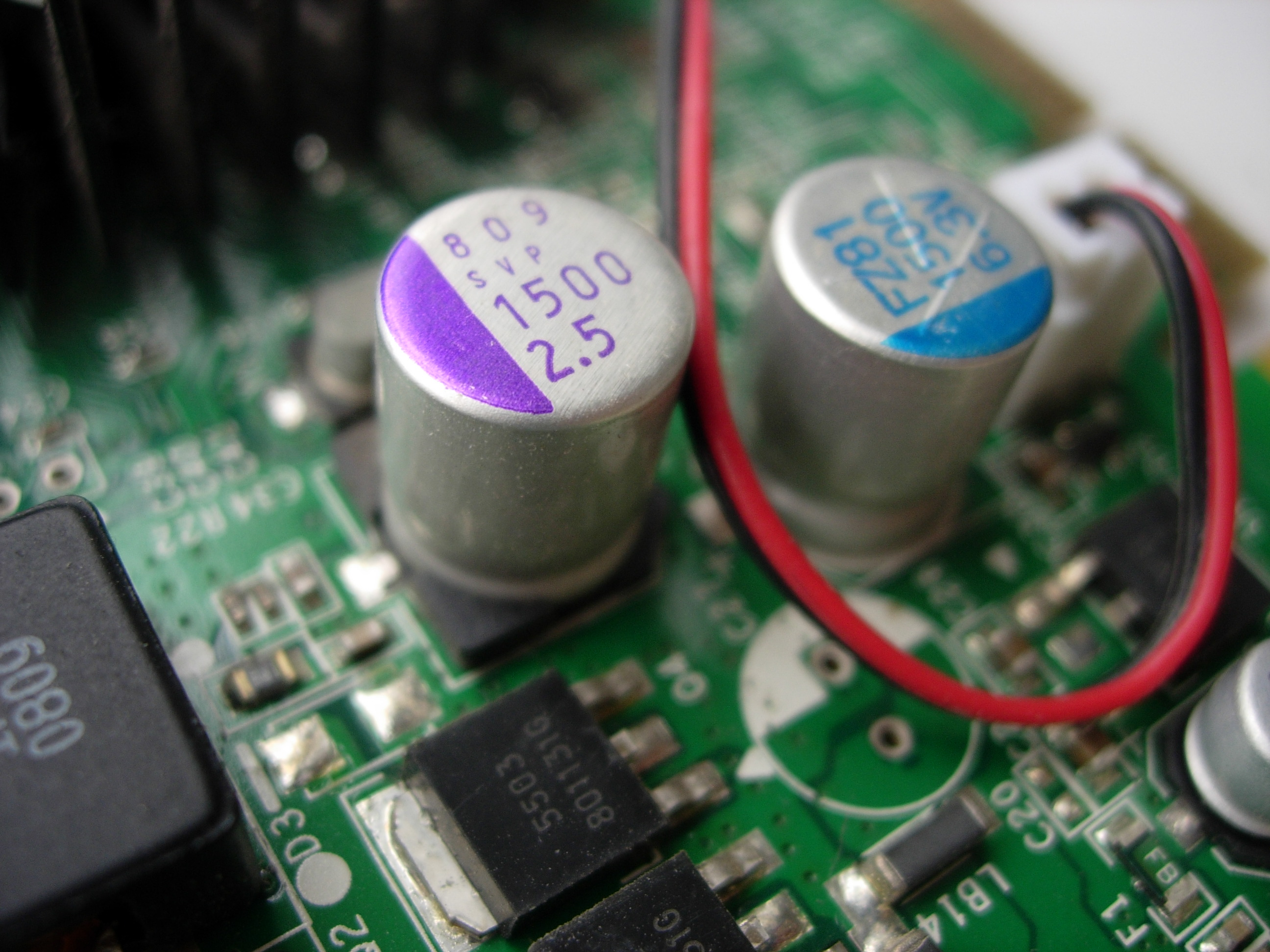 我旧显卡上的电容器